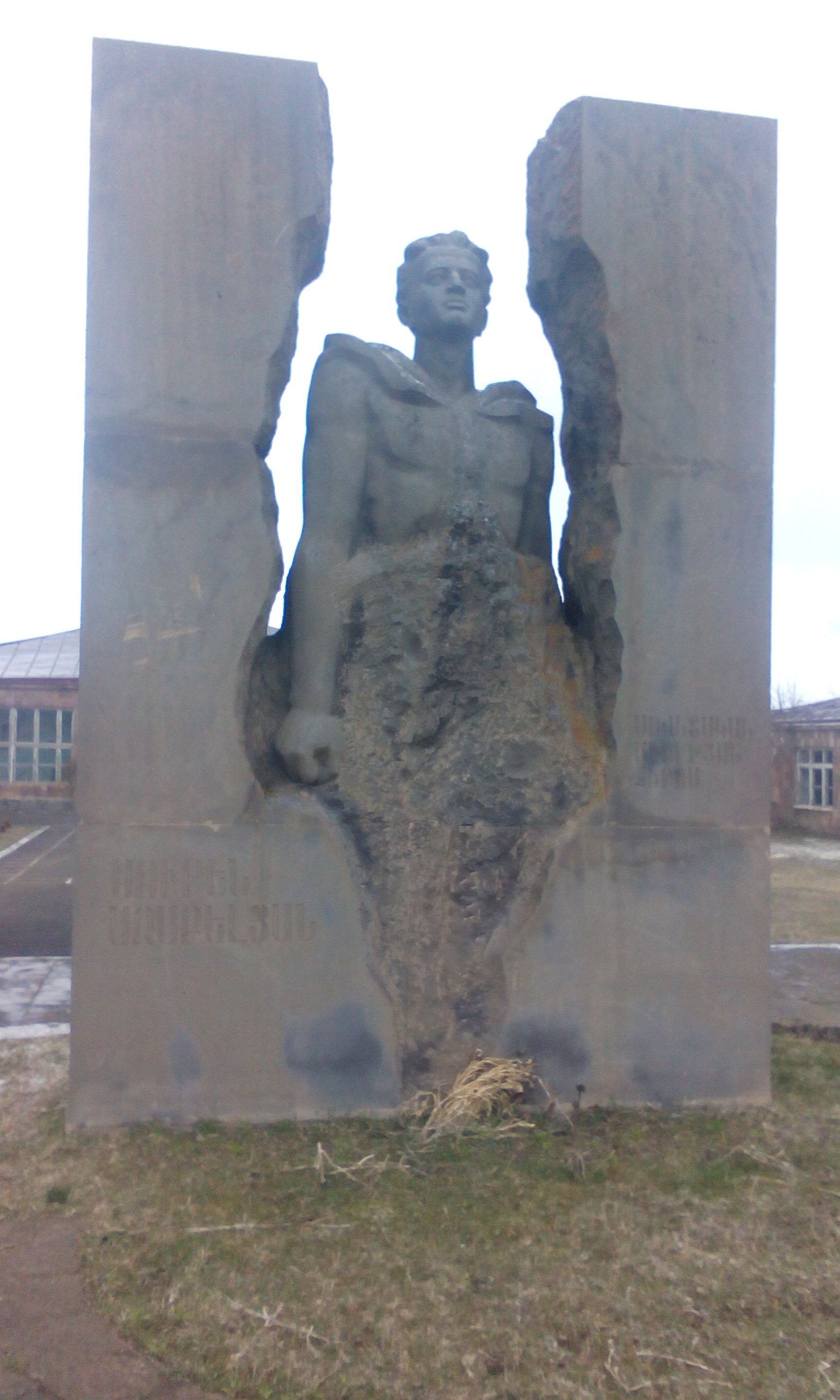 Սուրեն Առաքելյանի հուշարձանը Տաթև գյուղում